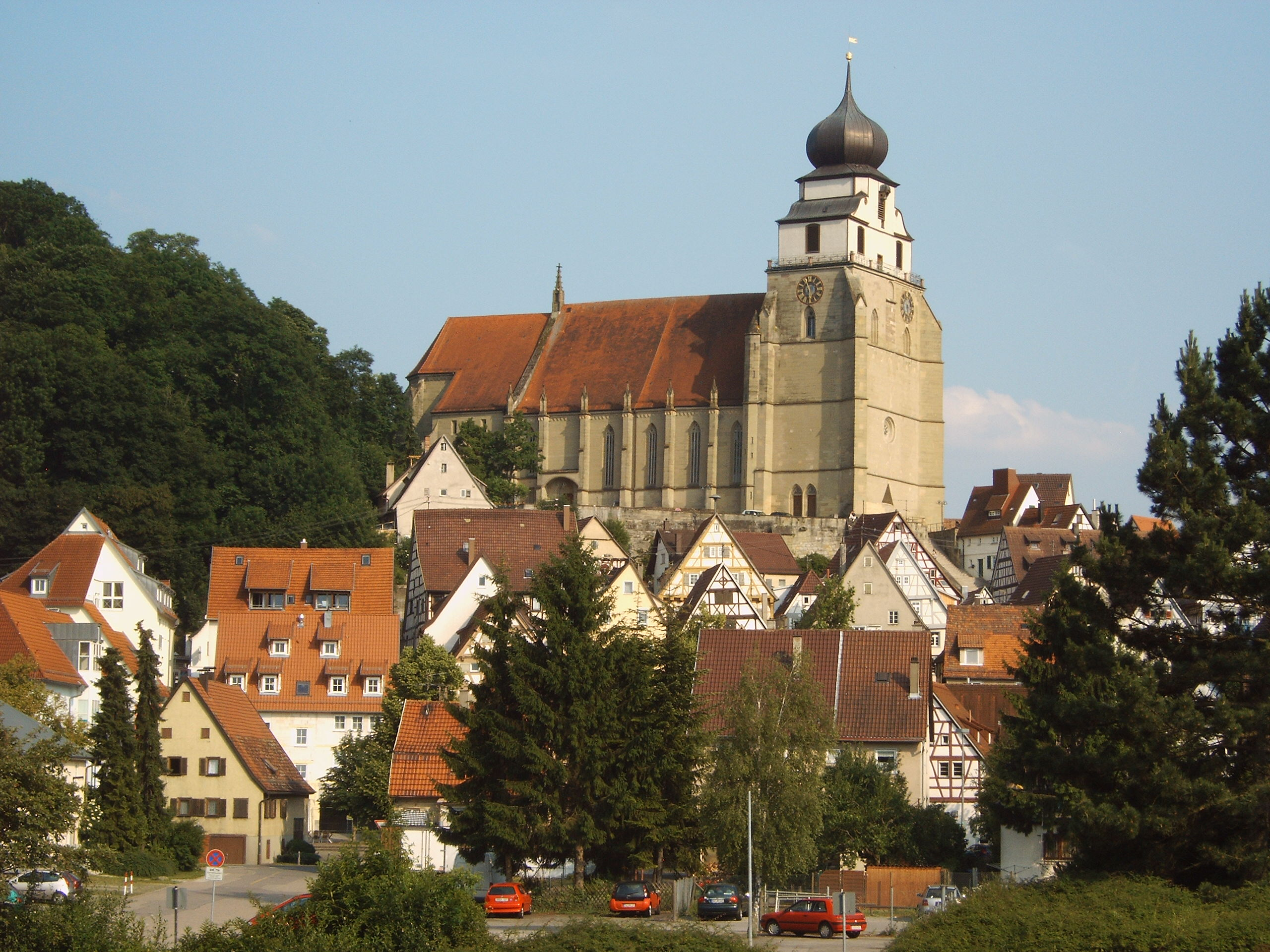 Stiftskirche Herrenberg, vom Platz hinter der Stadthalle